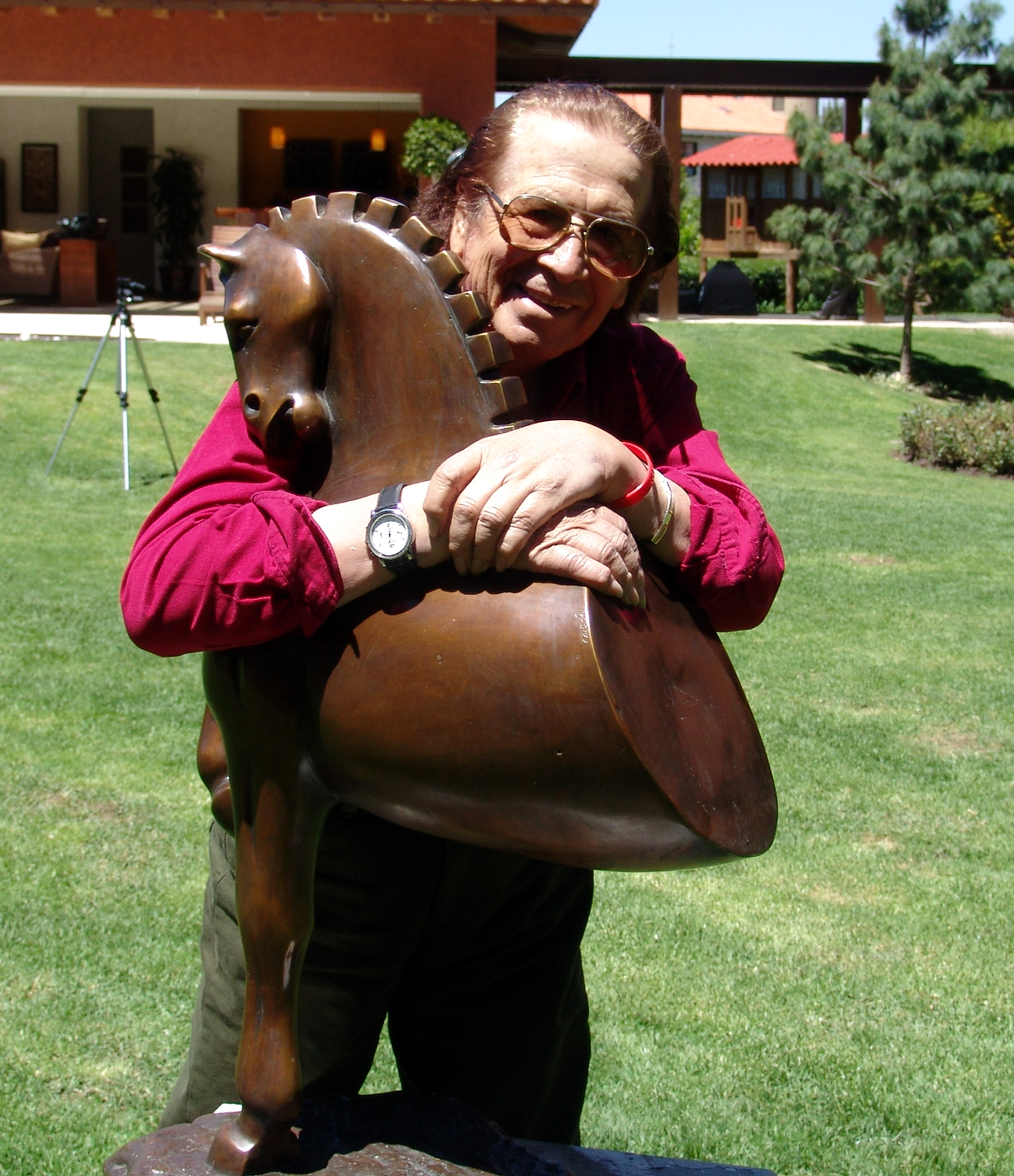 Escultor y pintor mexicano Heriberto Juárez.